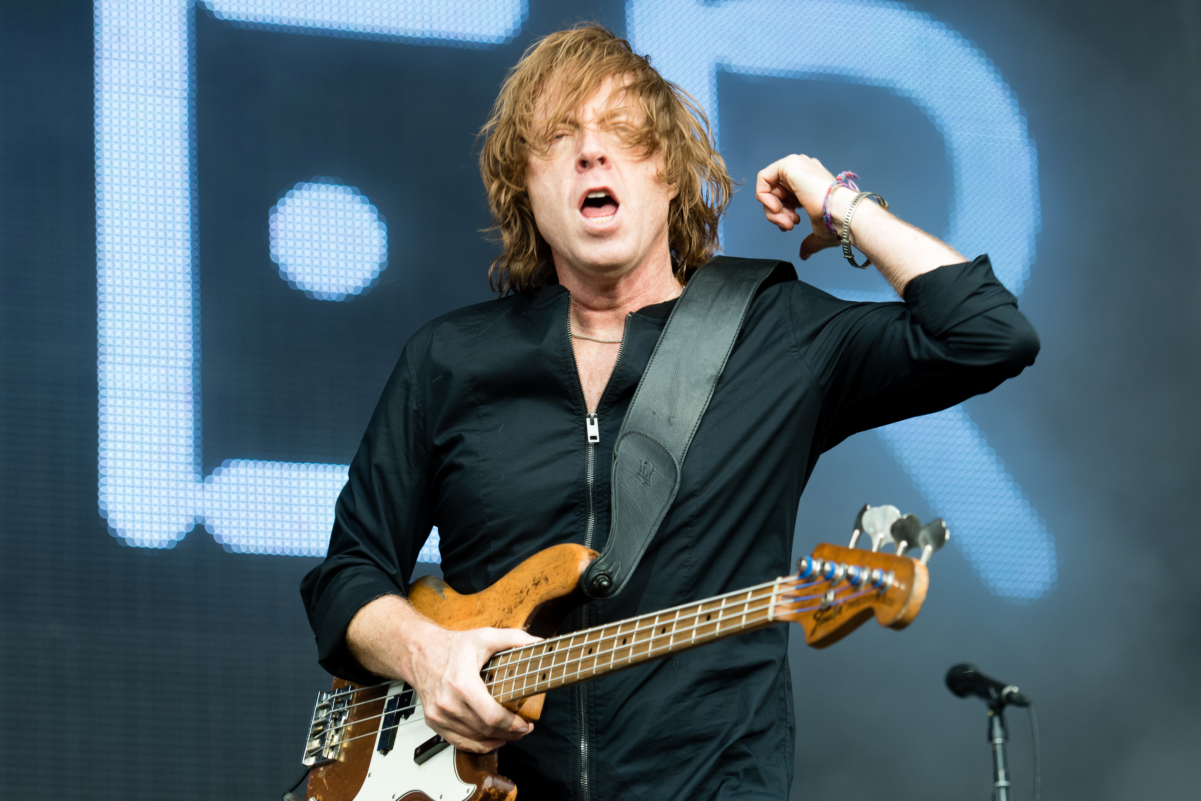 Foreigner beim Wacken Open Air 2016